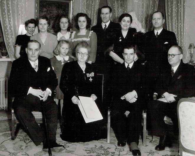 Aline Grönberg Suomen Leijonan Komentajamerkki